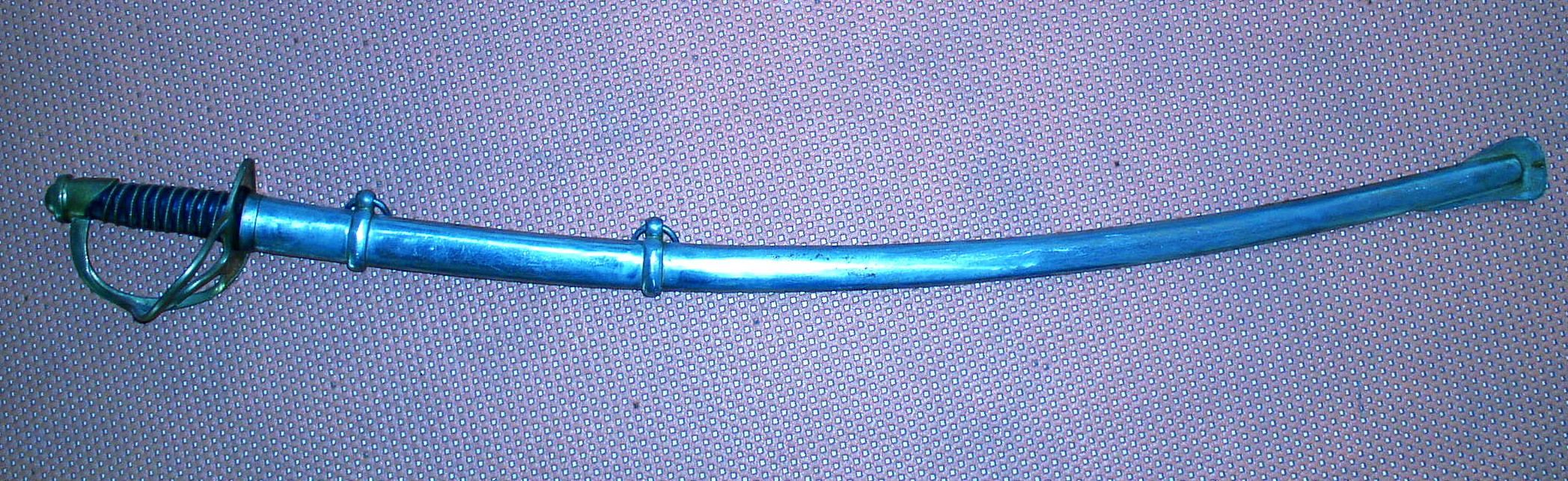 Ein original US-Kavallerie Säbel von Ames Manufactoring Co. 1862